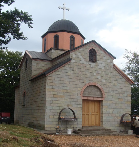 Св. Василиј на Пониква